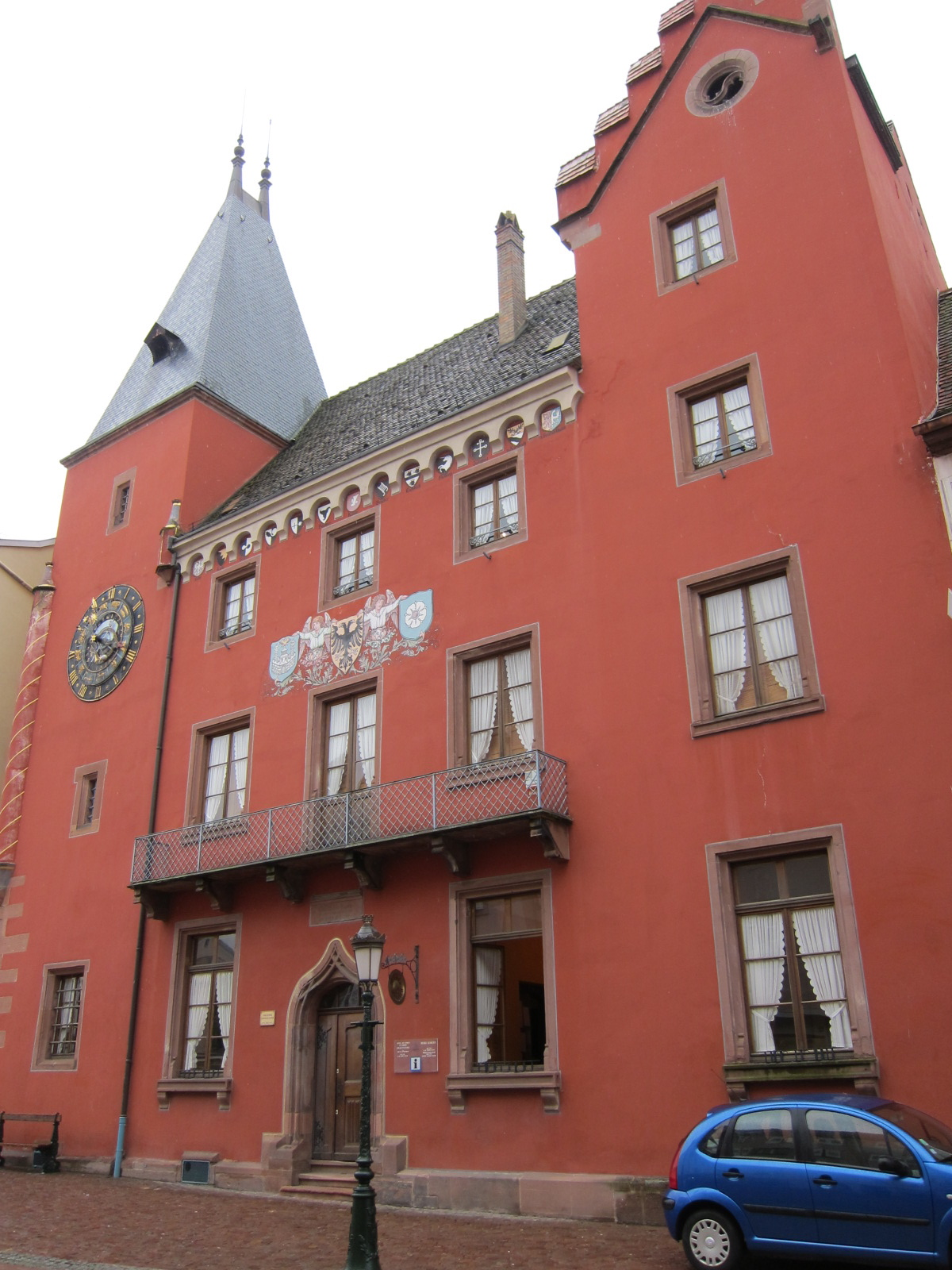 Alsace